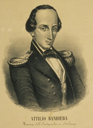 "Ritratto di Attilio Bandiera" ridotto